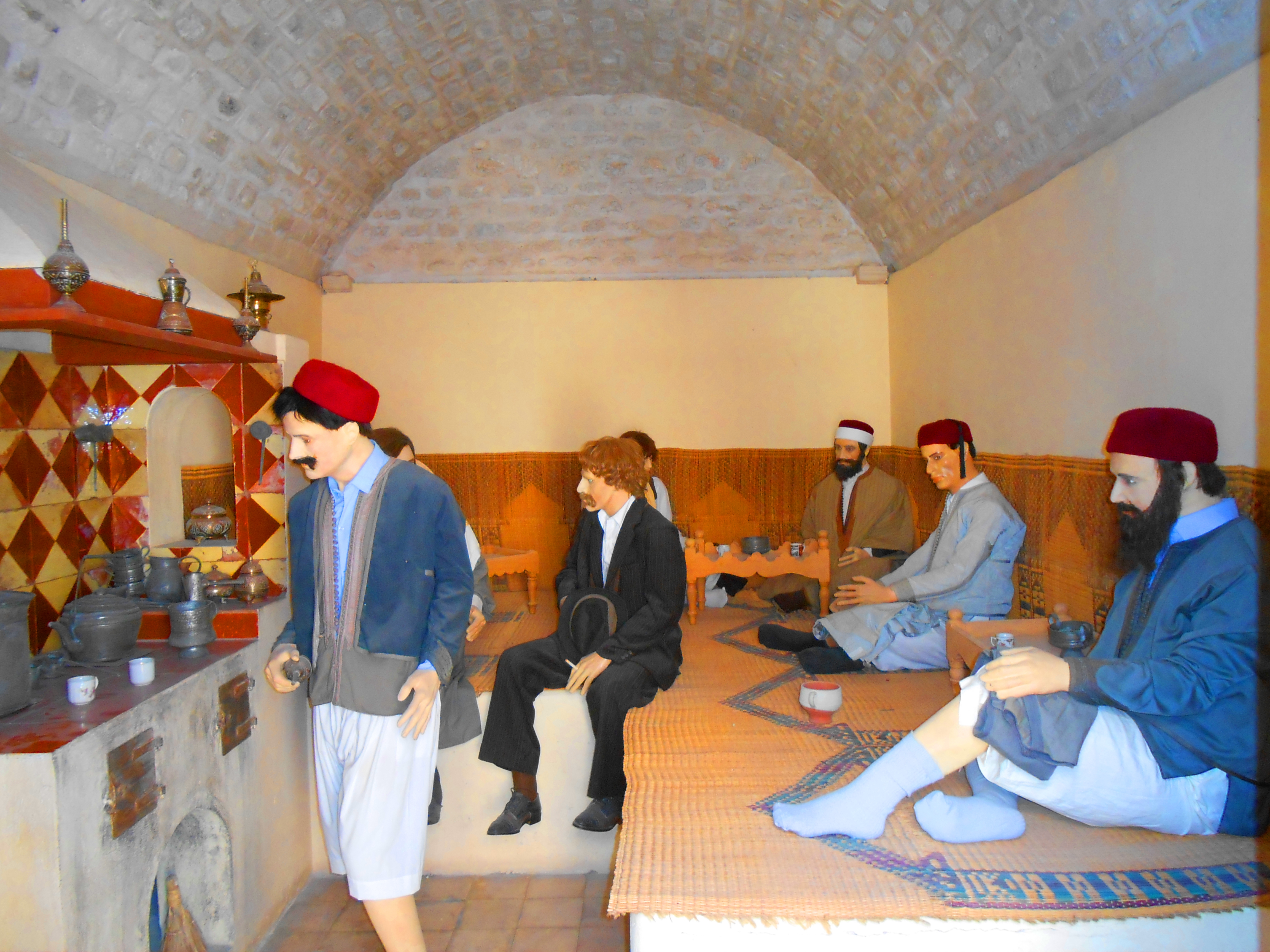 Café Bayn el Qahâwi, marabout Sidi Chérif et fondouk Daoui